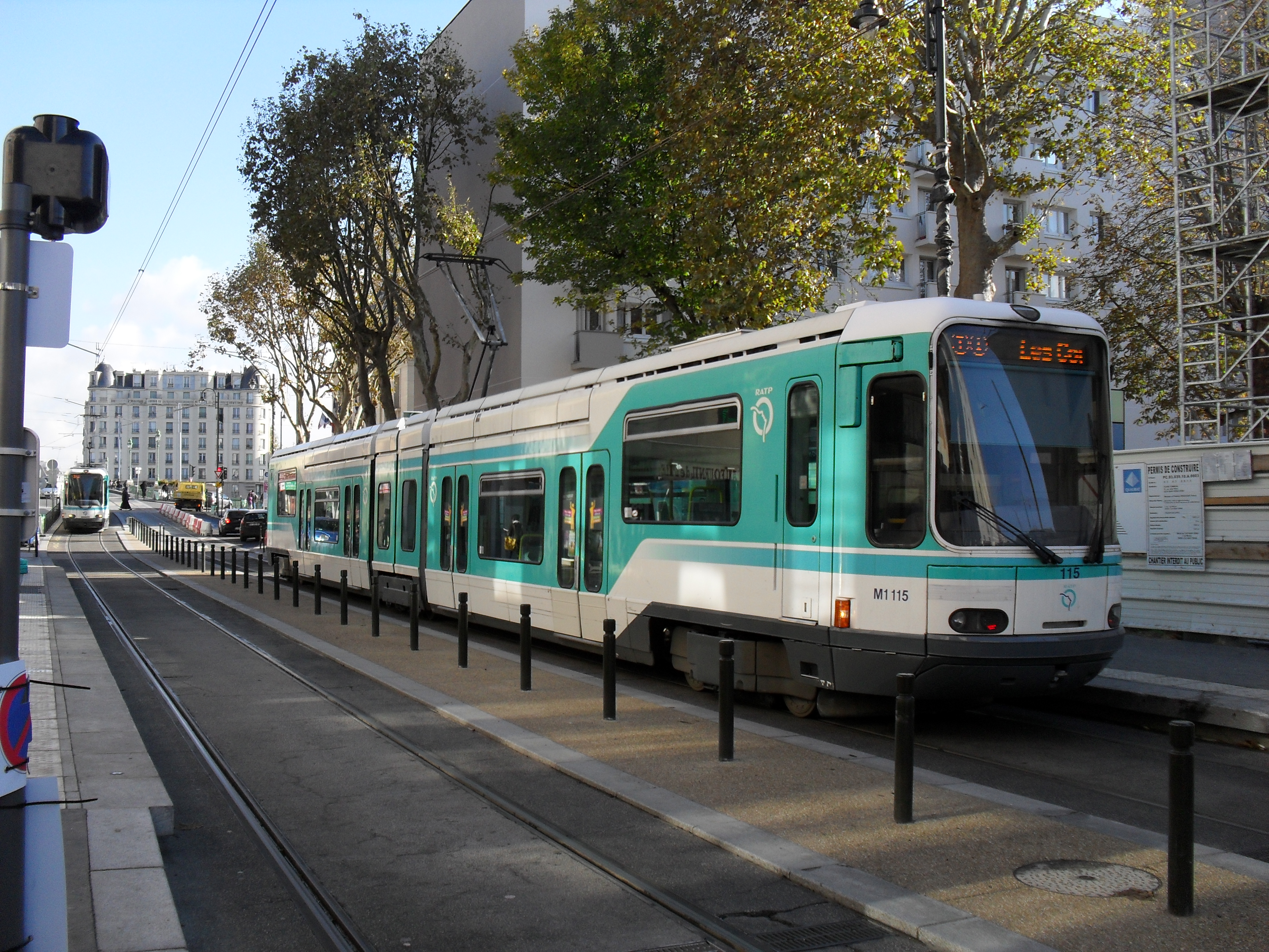 Paris Tramway ligne 1